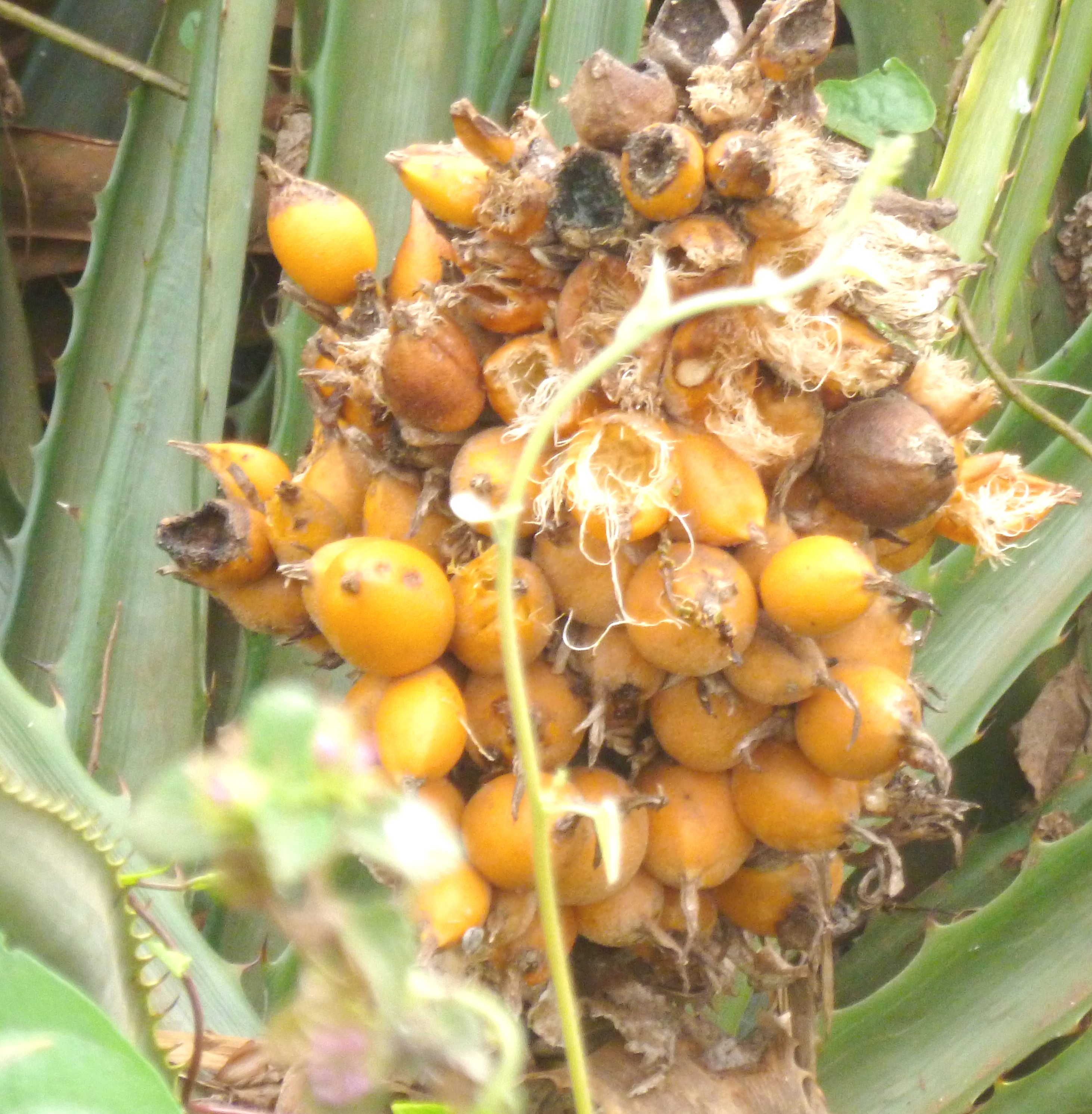 BROMELIA PINGUAN BALANSAE de los ESTEROS DEL IBERA ( el segundo mayor humedal del mundo,) provincia de Corrientes, Argentina.